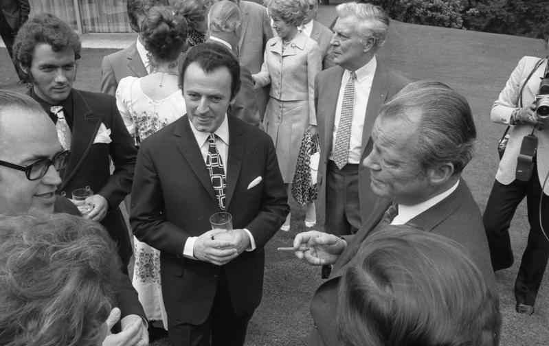 Bundeskanzler Willy Brandt empfängt Filmschauspieler